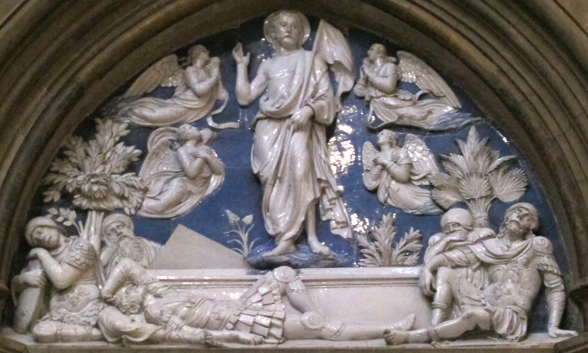 Sagrestia dei canonici, resurrezione di luca della robbia 2